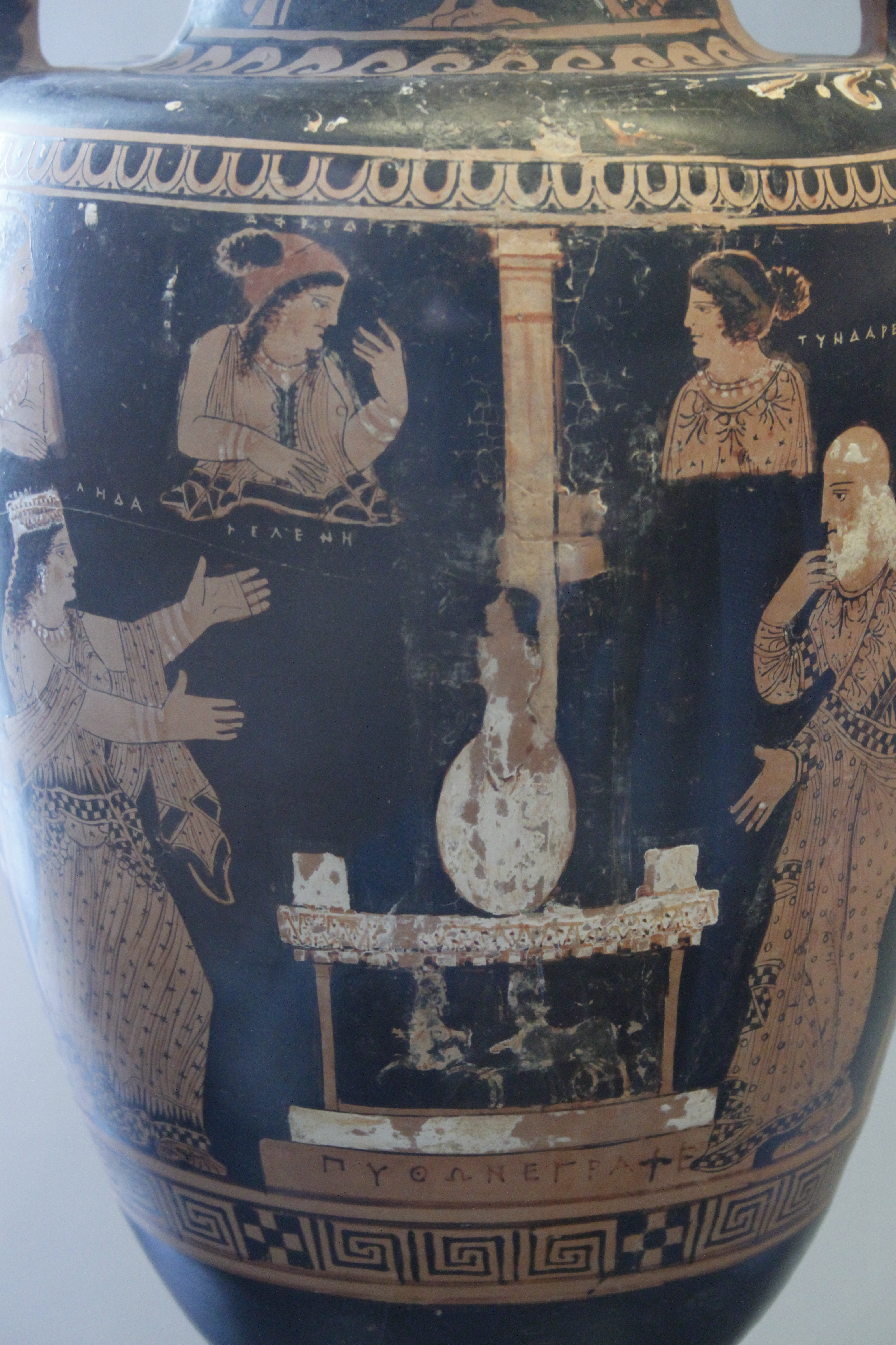 Elena nasce dall'uovo. Particolare di una anfora a collo del IV secolo a.C., firmata da Phyton, nel corredo della tomba 24 di Andriuolo. Conservata al Museo archeologico nazionale di Paestum.